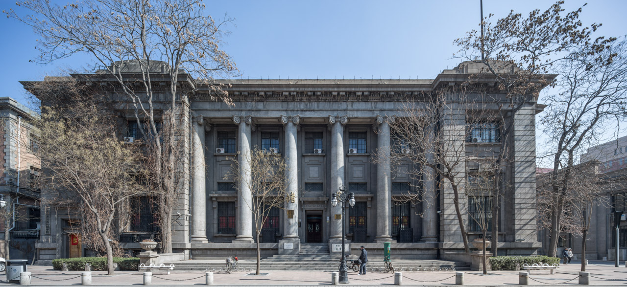 天津麦加利银行大楼